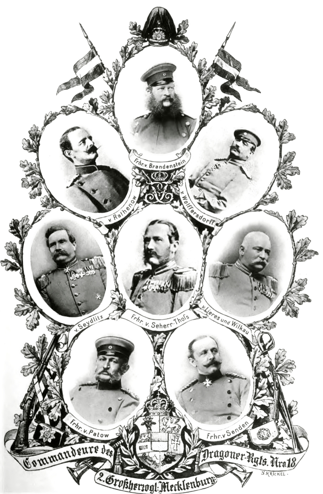 Kommandeure des 2. Großherzoglich Mecklenburgischen Dragoner-Regiment Nr. 18